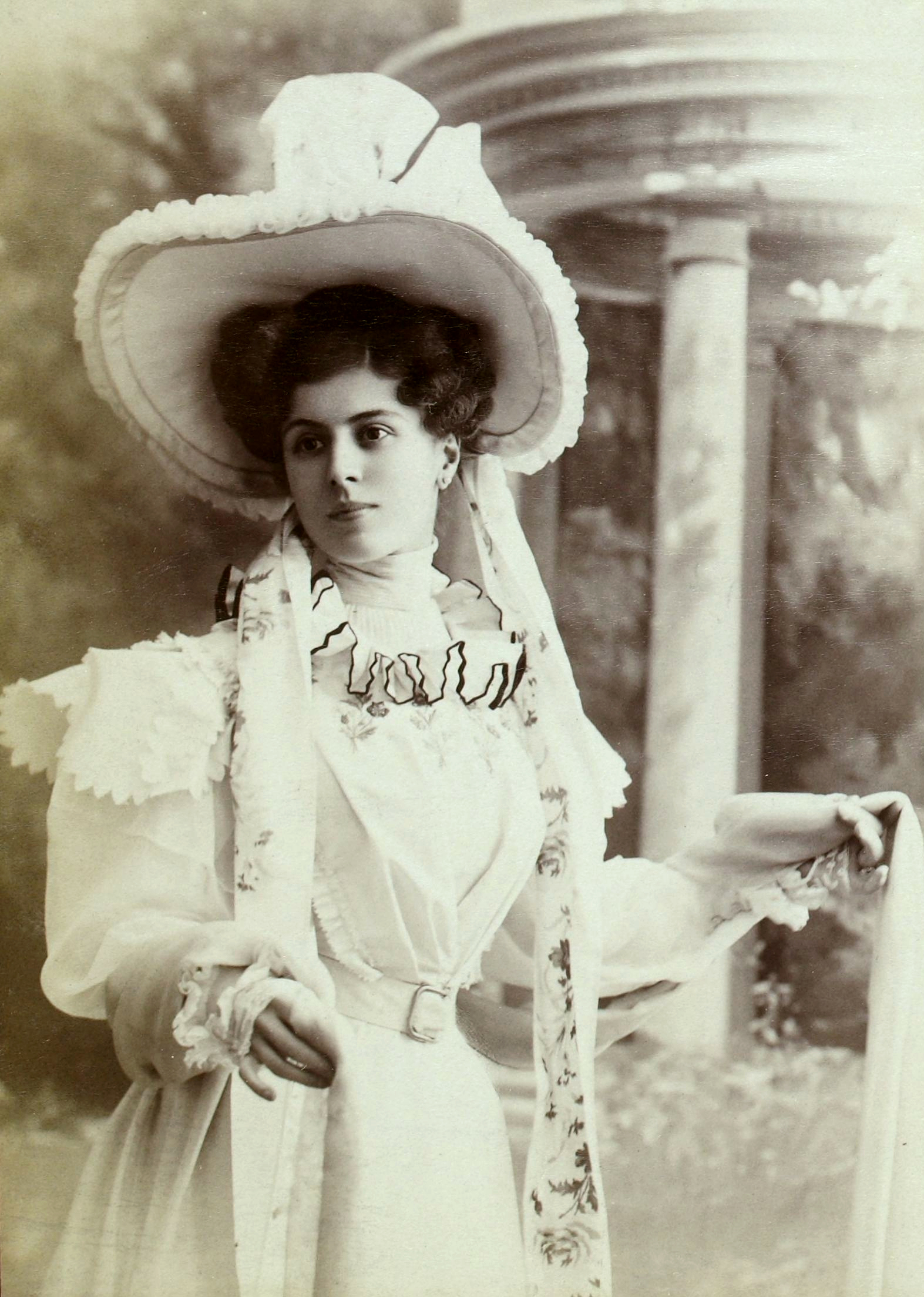 [Album Reutlinger de portraits divers, vol. 18] : [photographie positive] : Yvonne Garrick